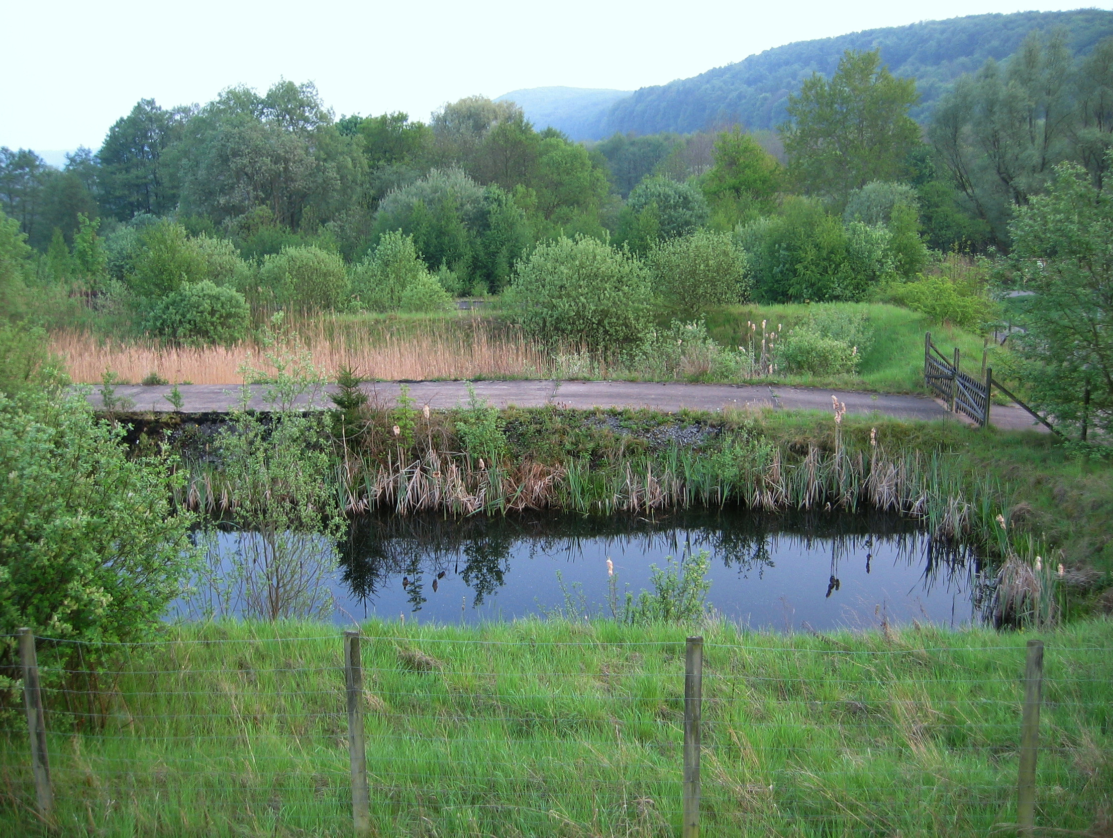 Blick von Norden über die aufgegebenen und teilweise mit Rohrkolben und Schilfrohr bestandenen Torflager außerhalb des NSGs ins Naturschutzgebiet Satzer Moor, Herste, Bad Driburg, Deutschland.